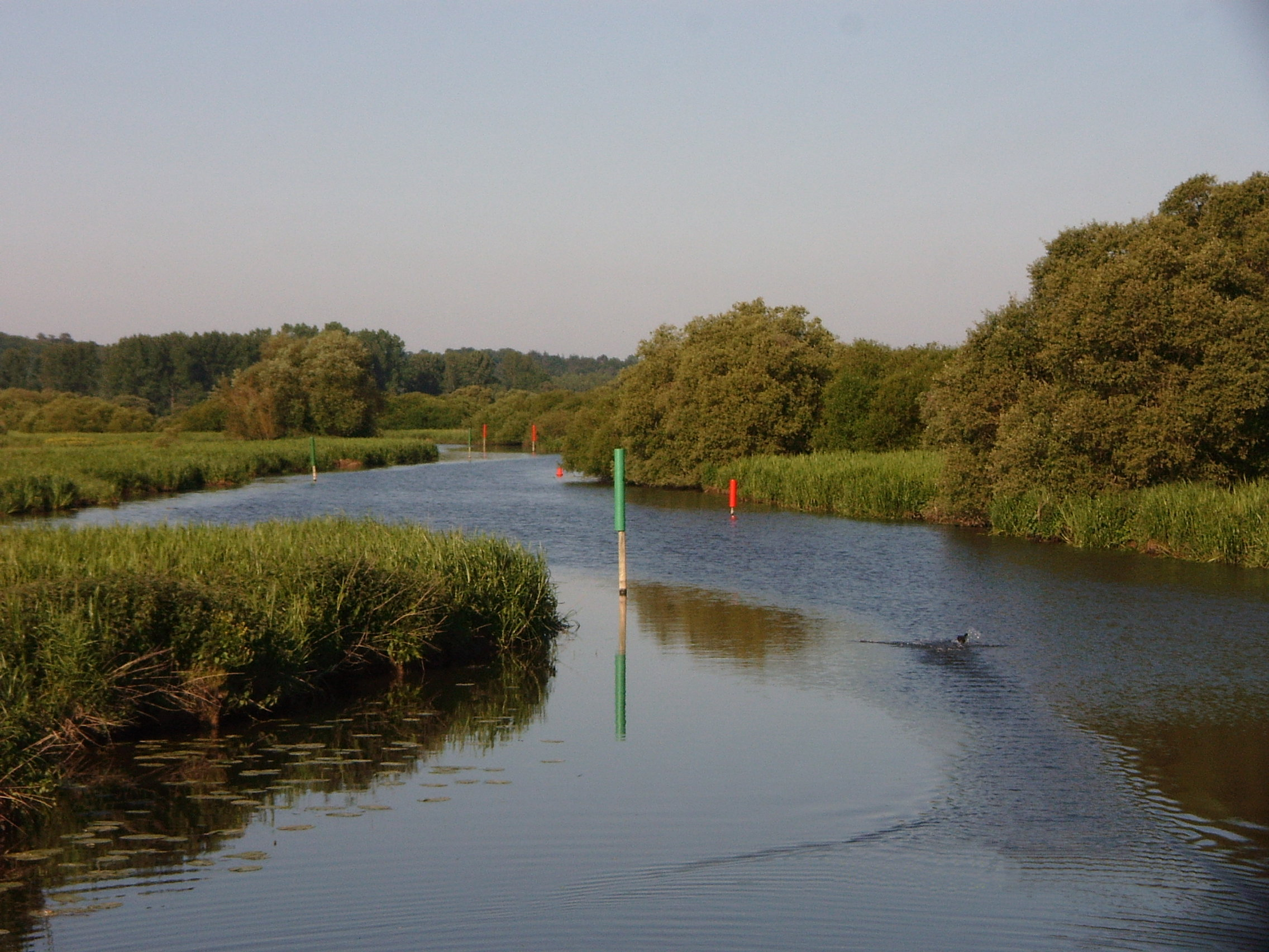 Das Mündungsgebiet des Aff in den Oust ist eine Moorlandschaft.